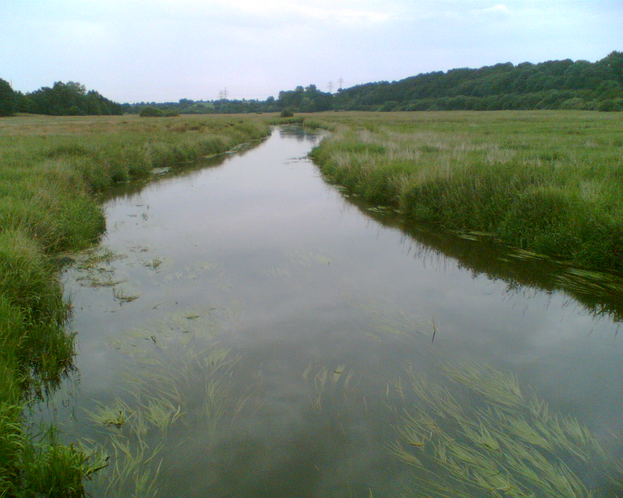 Oberlauf der Eider bei Molfsee